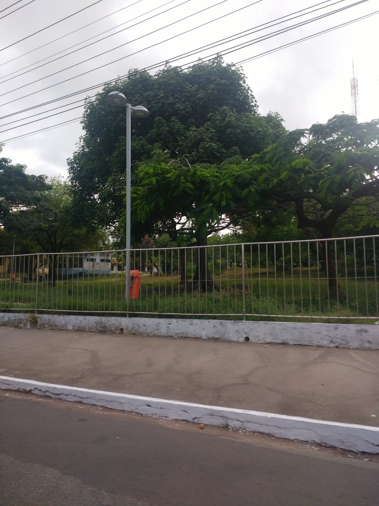 Parque do Bom Menino, localizado no Centro de São Luís (MA)